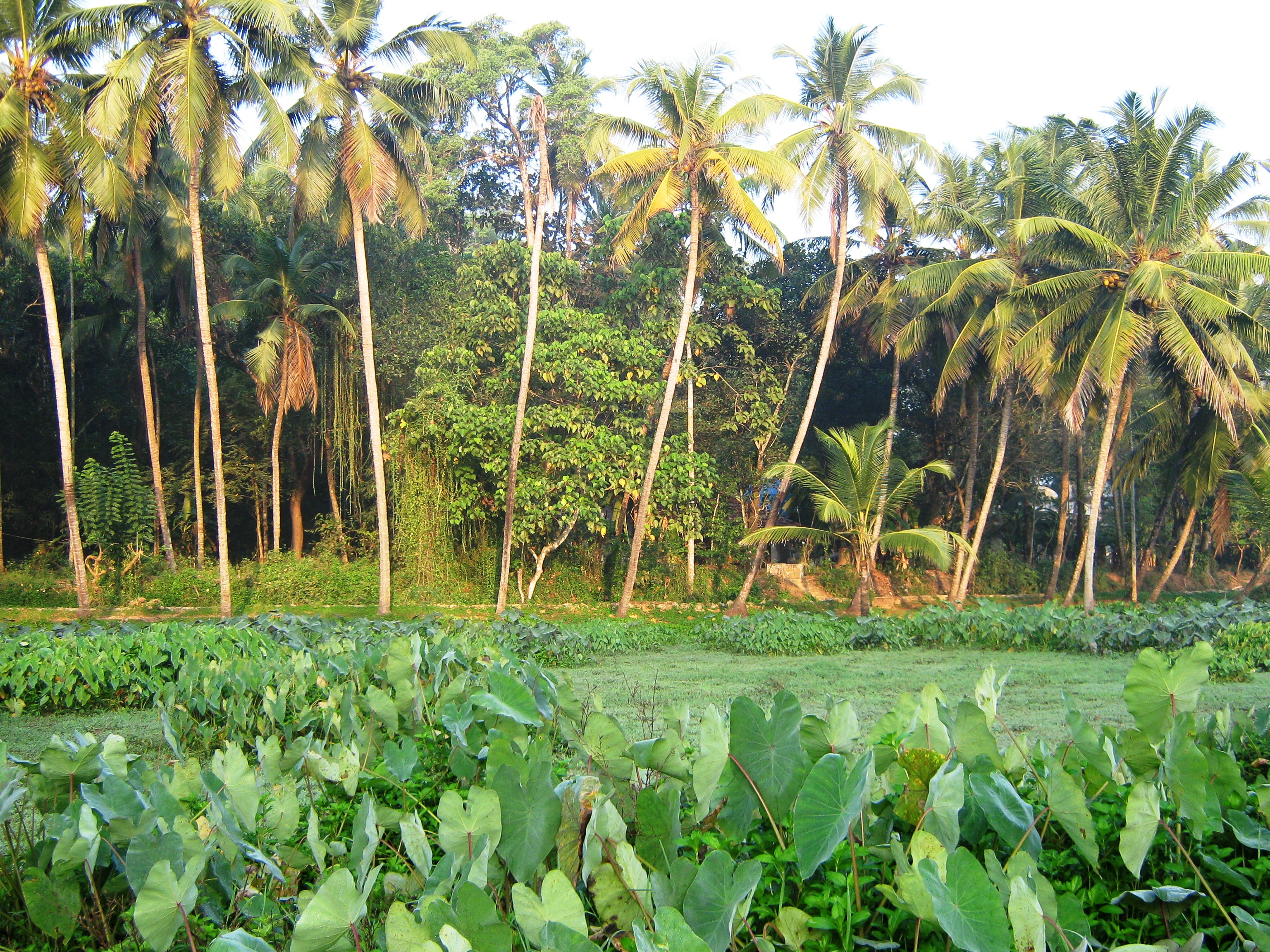 Edachovva, Kannur, Kerala, India.